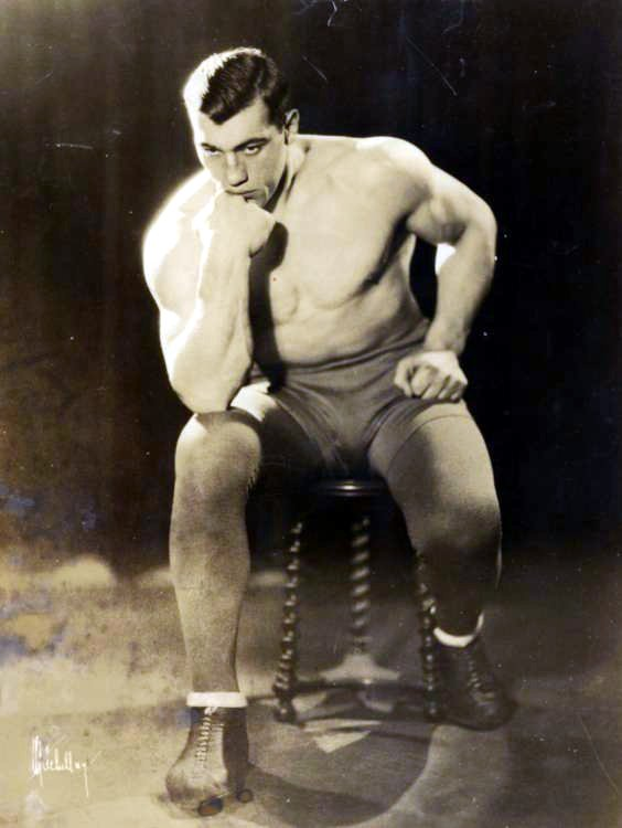 Foto di Primo Carnera